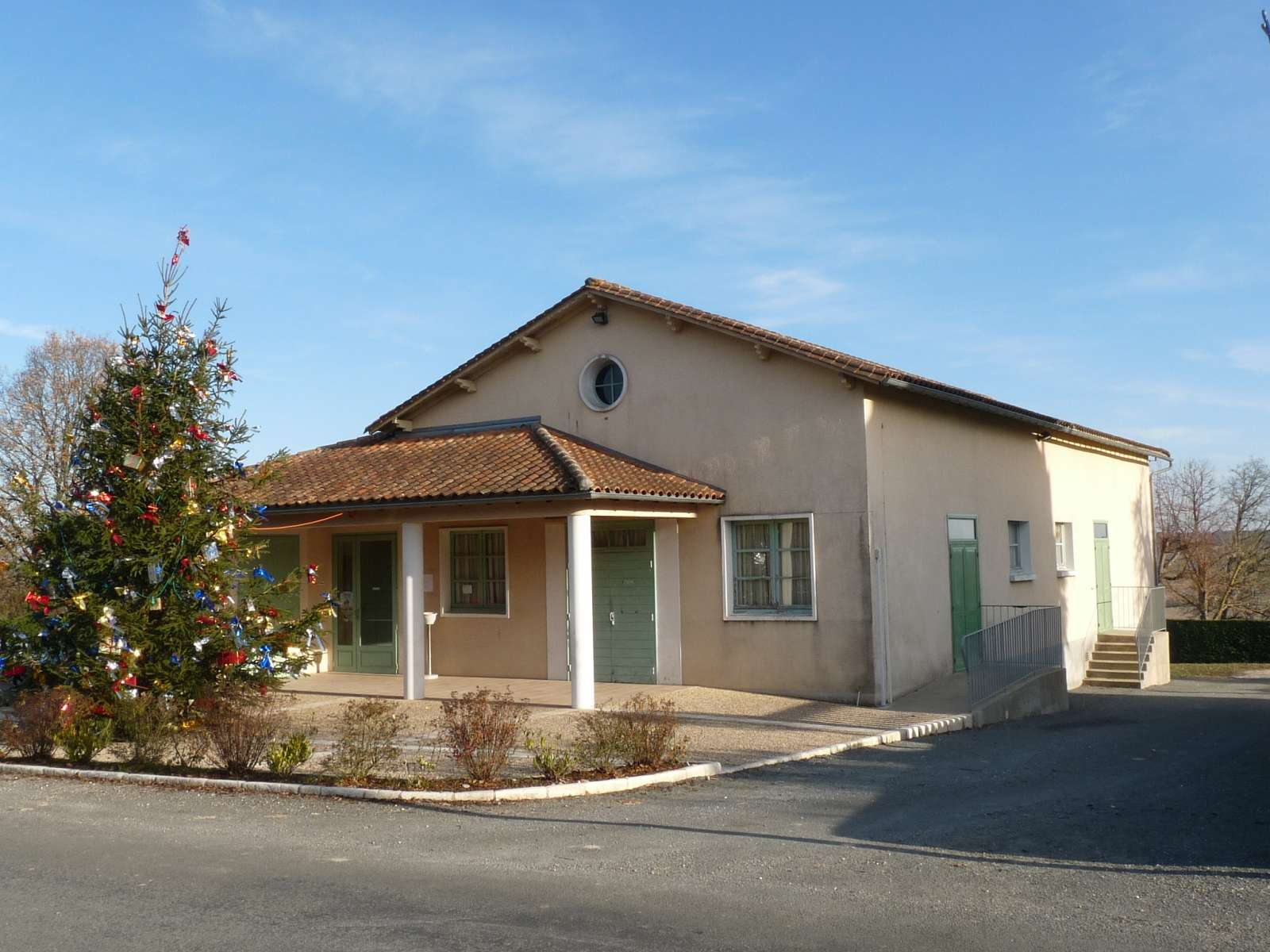 salle des fêtes de Festalemps, Dordogne, France